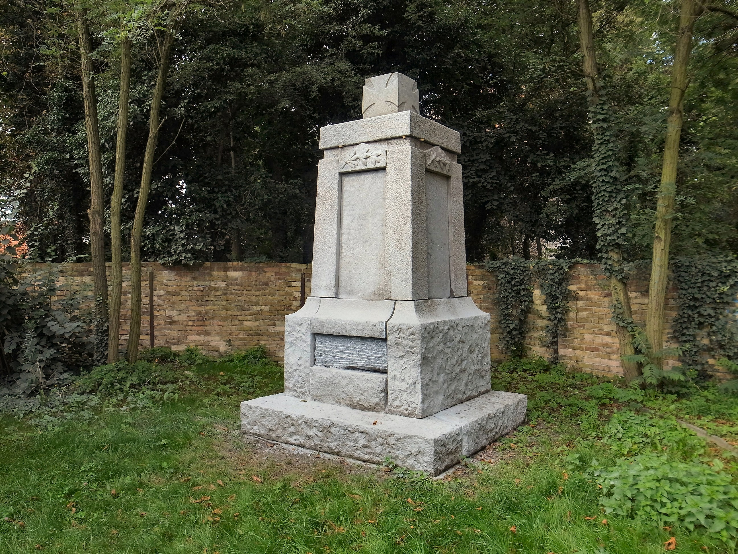 Sandersdorf, Gefallenendenkmal 1. Weltkrieg